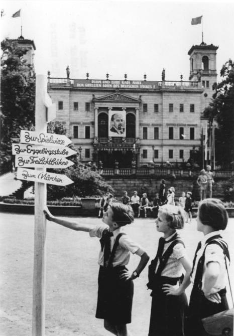 Dresden, Pionierpalast Zentralbild Höhne-Pohl Str-Qu 10.7.1953 Frohe Ferientage für alle Kinder Der Pionierpalast "Walter Ulbricht" in Dresden stellt seine gesamten Räume un den Park für die Ferienspiele der Dresdener Kinder zur Verfügung. UBz: Viele Möglichkeiten gibt es hier für unsere Jüngsten, ihre Ferien froh zu verleben.